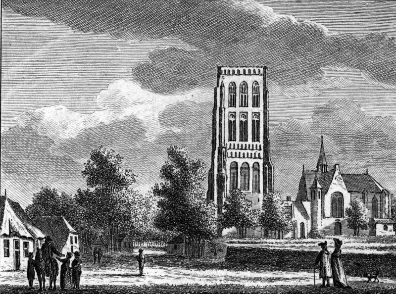 Vught: Dorpsgezicht met de St. Lambertustoren en de Ned. Hervormde kerk (voormalige Lambertuskerk) vanuit het zuiden; naar een gewassen pentekening van Jan Bulthuis; sculpsit K.F. Bensdorp. Datering: - 1790